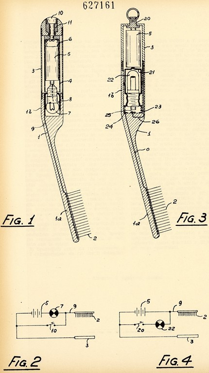 Disegno per il brevetto per invenzione industriale n. 627161, classe A 61 c., della società Texmar spa per uno spazzolino da denti ad azione elettrica per il trattamento con fluoro o simili delle malattie dentarie, Milano. Data di deposito: 20 aprile 1960. Data di concessione: 26 ottobre 1961 (AS Genova, Ufficio provinciale industria, commercio e artigianato di Genova, Fondo Brevetti)